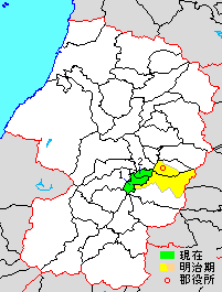 山形県東村山郡の位置。